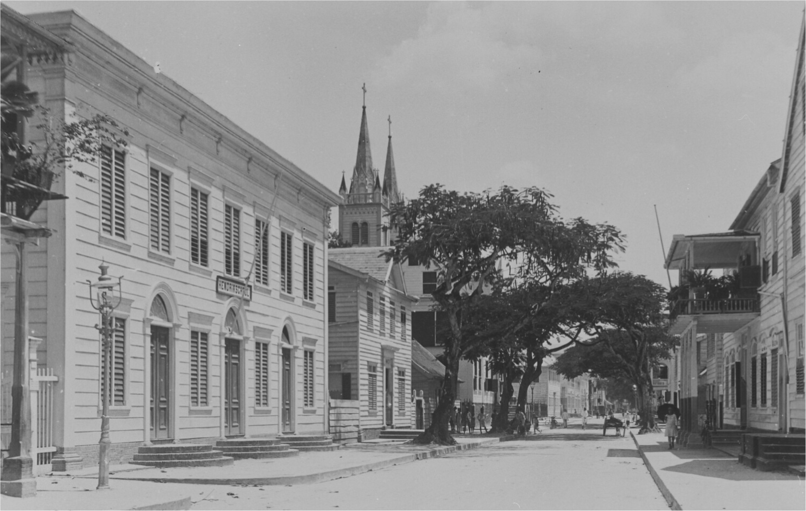 foto. De Gravenstraat met de Hendrikschool, de Surinaamsche Bank en de torens van de Sint Petrus en Paulus kathedraal